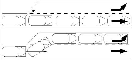 Schéma de blocage de carrefour Image créée avec et Gimp par Luk licence GFDL